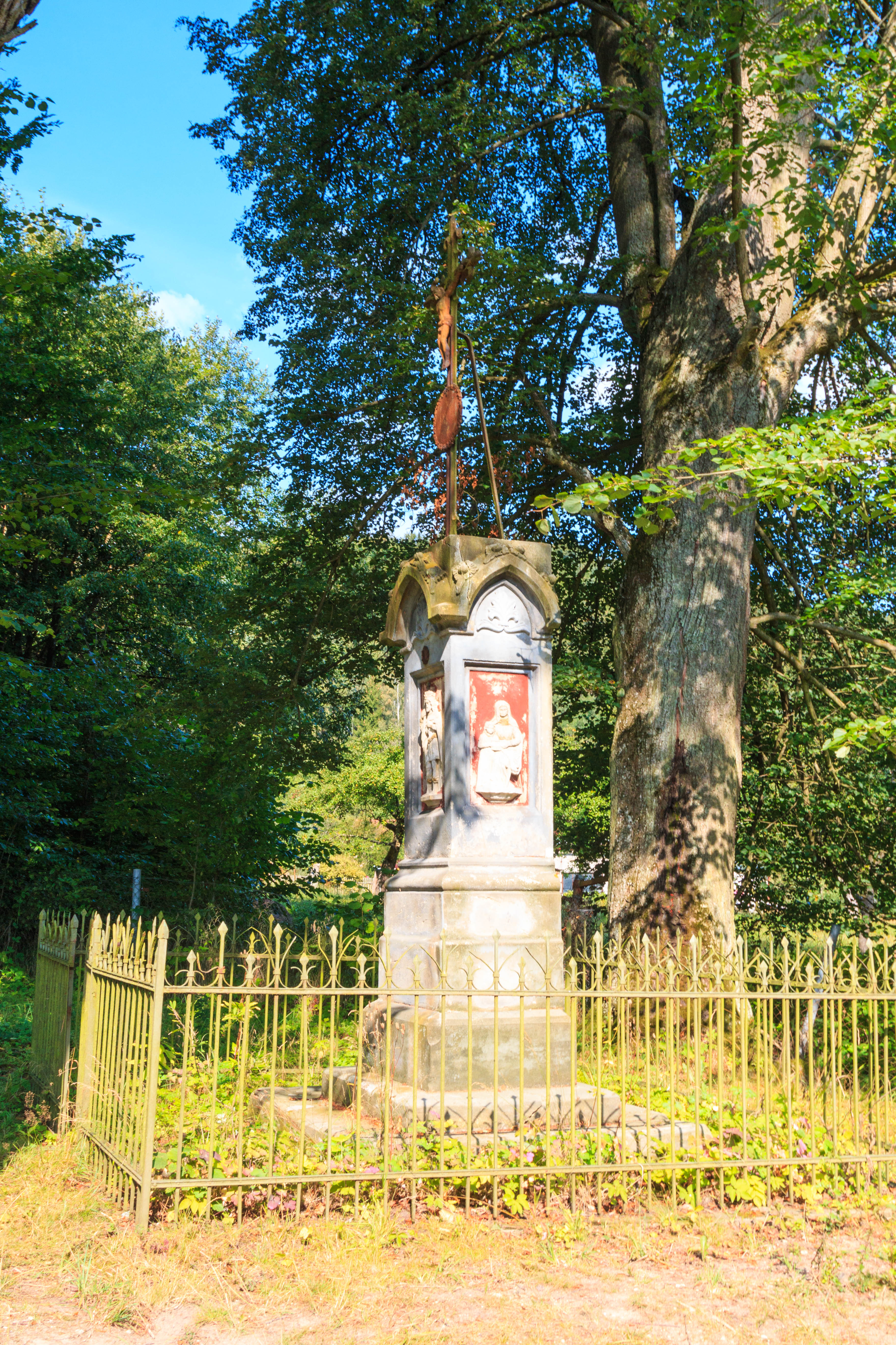 Dolany u Mokré Lhoty - křížek